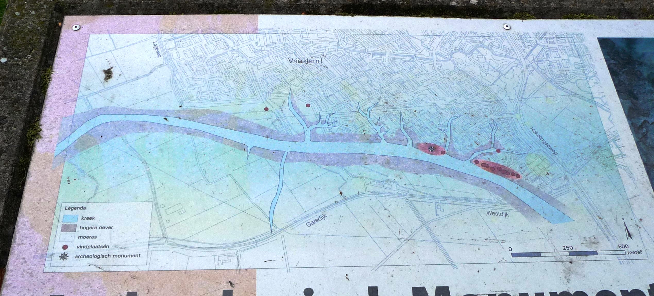 Archeologisch monument Jagerskreek, Spijkenisse - kaart van het gebied